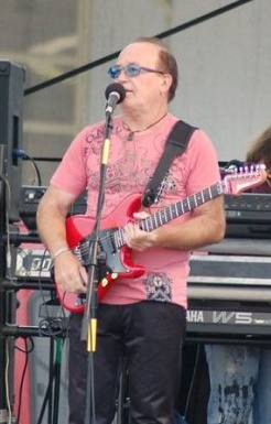 Petr Janda v Brně.